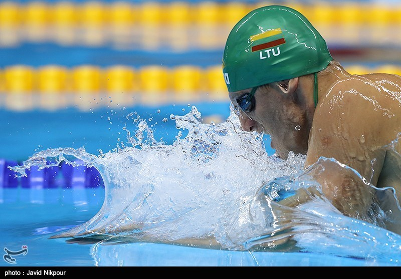 Swimming at the 2016 Summer Olympics – Men's 200 metre breaststroke